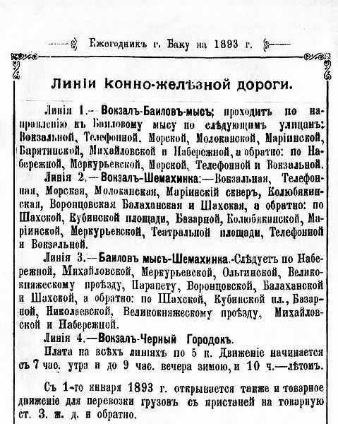 Ежегодник города Баку. 1893 год